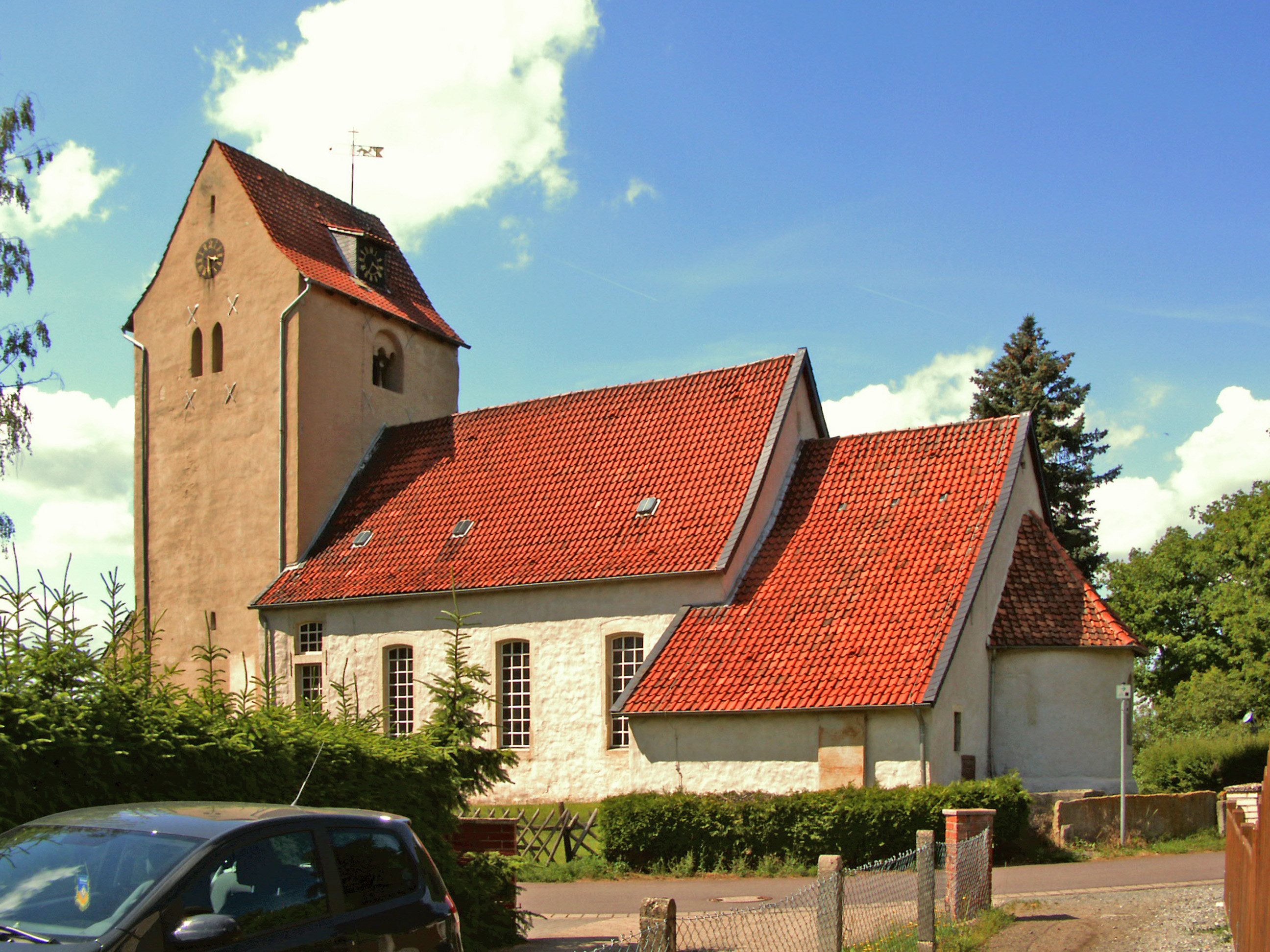 Evangelisch-lutherische Kirche St. Stephani in Ochsendorf, Ortsteil von Königslutter